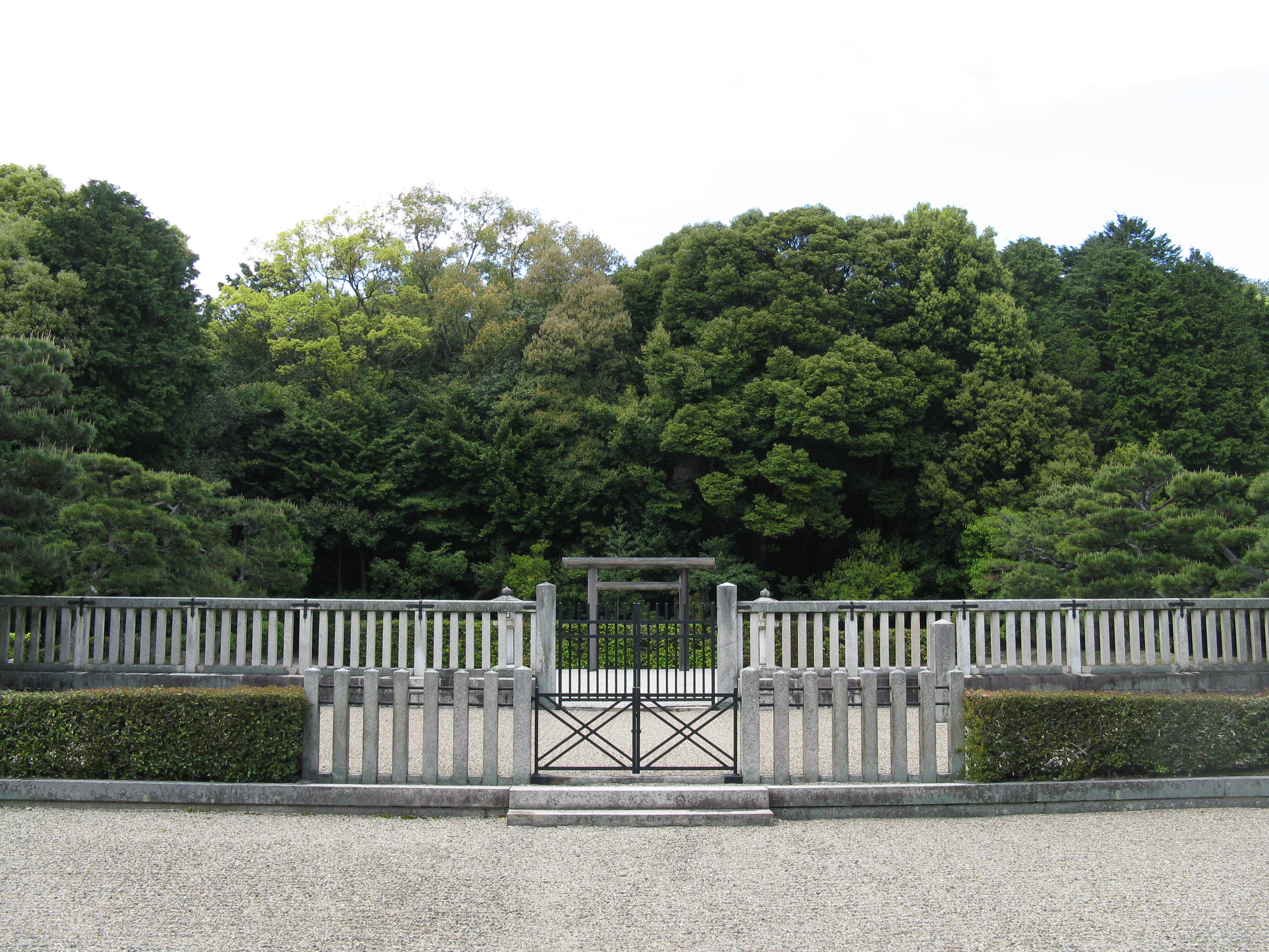 成務天皇 狭城盾列池後陵